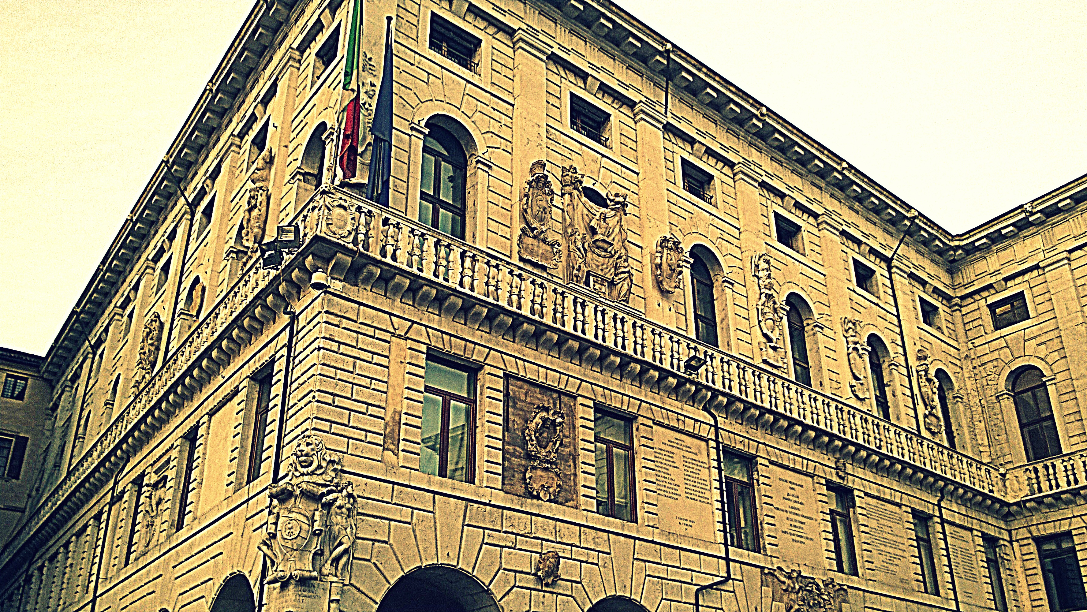 Il Palazzo del Podestà a Padova.